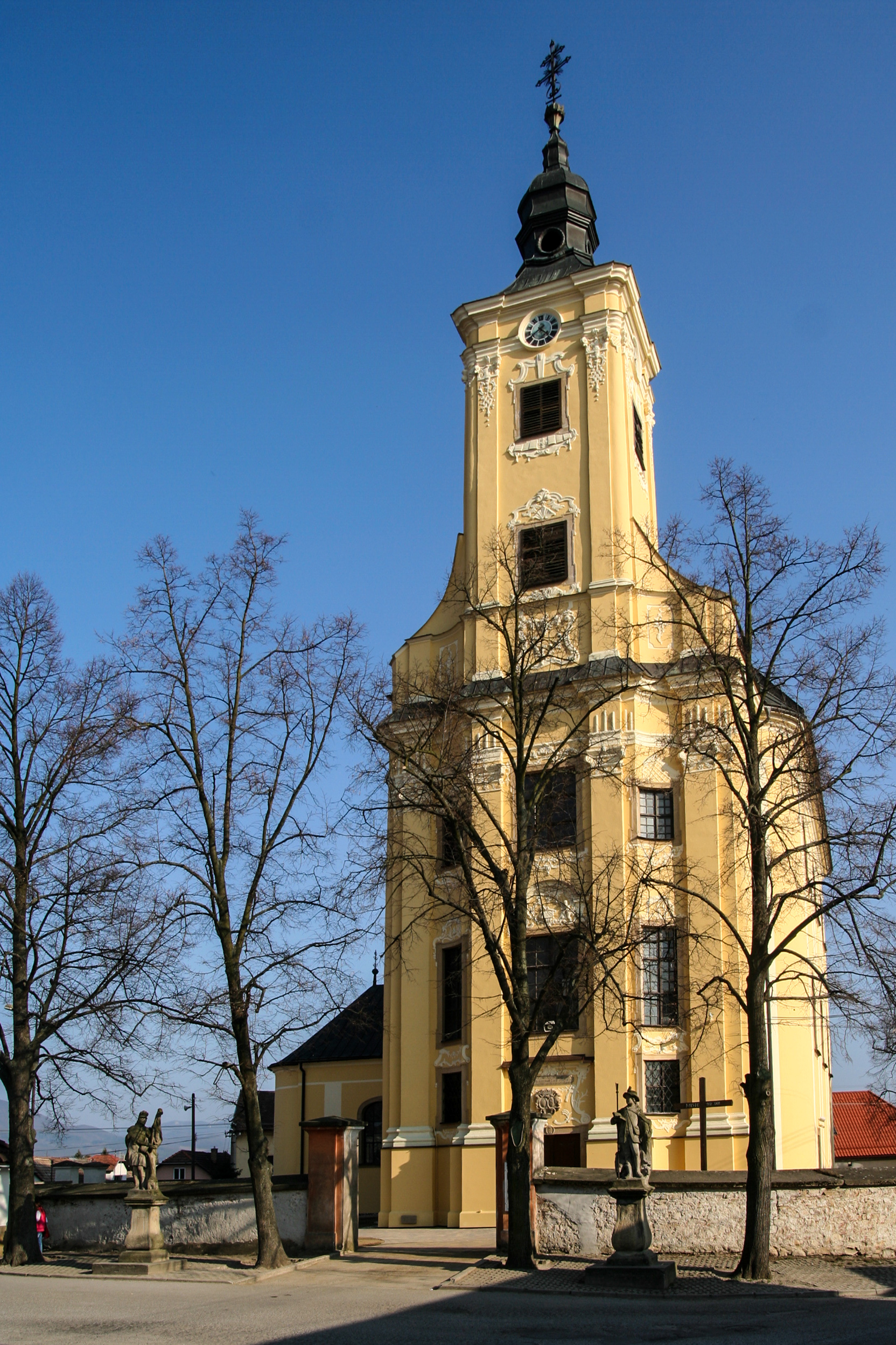 Kostol sv. Petra a Pavla, Pruské